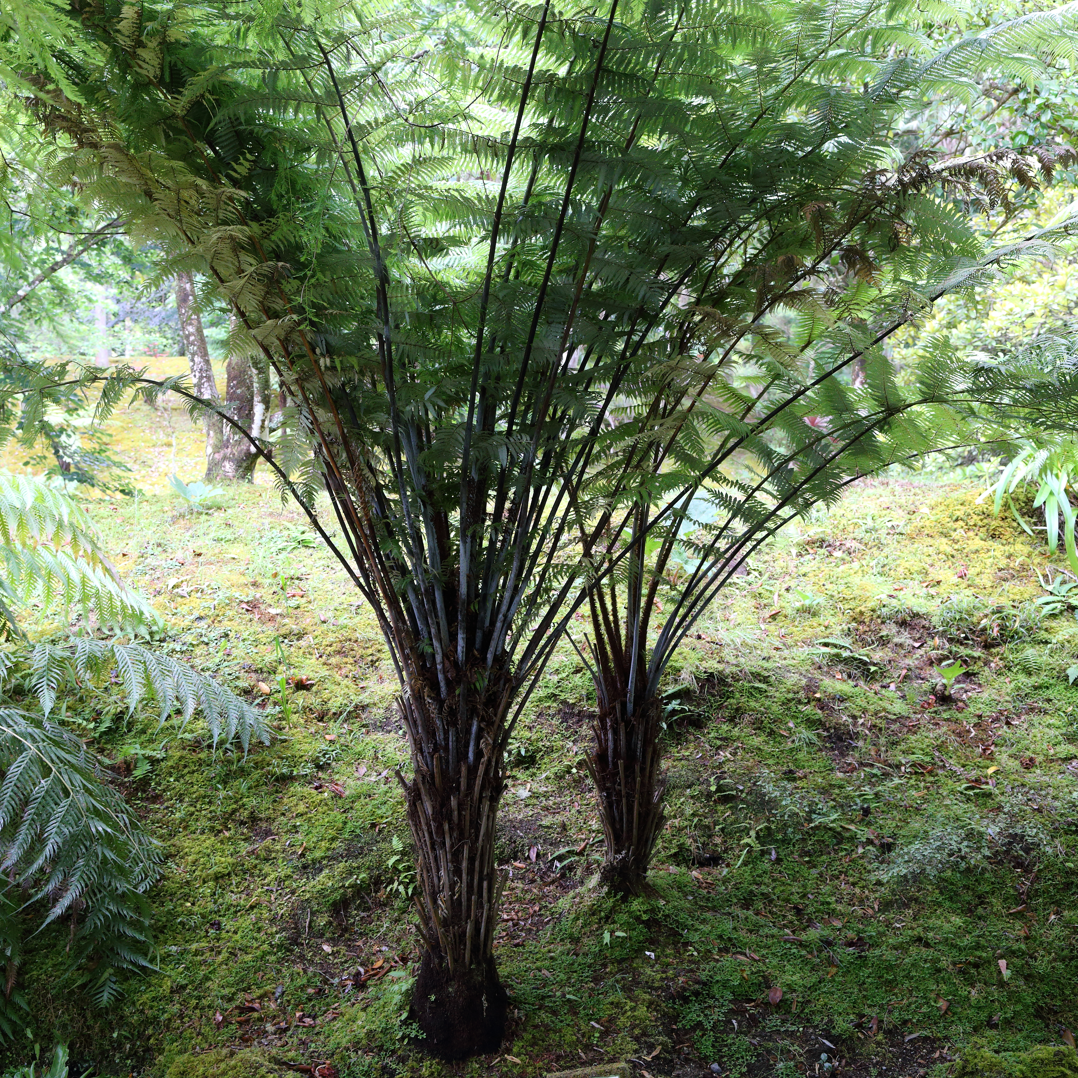 Cyathea dealbata i parken Terra Nostra, Furnas, Azorena.